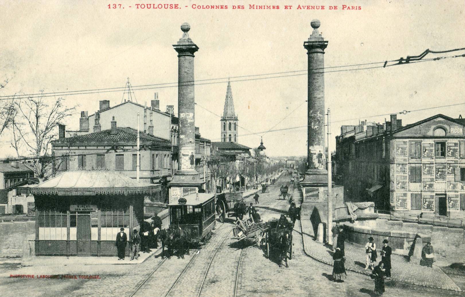 Carte postale ancienne éditée par Phototypie Labouche frères, n°137 :TOULOUSE - Colonnes des Minimes et Avenue de Paris